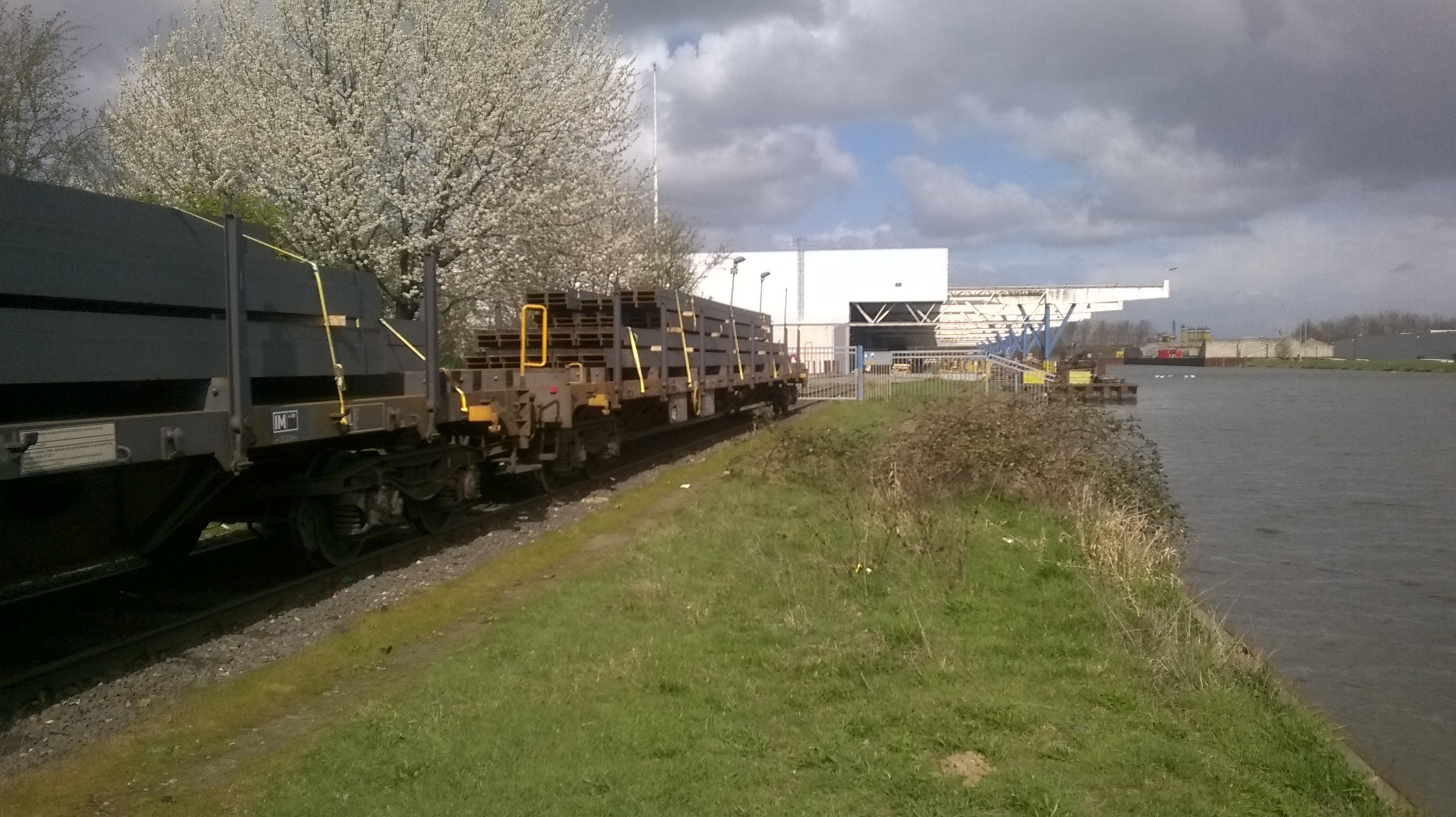 Treinwagons met staalprofielen uit de fabriek van Belval in Esch-sur-Alzette te Luxemburg staan op de westkade van de Franciscushaven in Born. Ze zullen gelost worden achter het hek bij Staalhandel ArcelorMittal. Foto genomen in noordelijke richting.